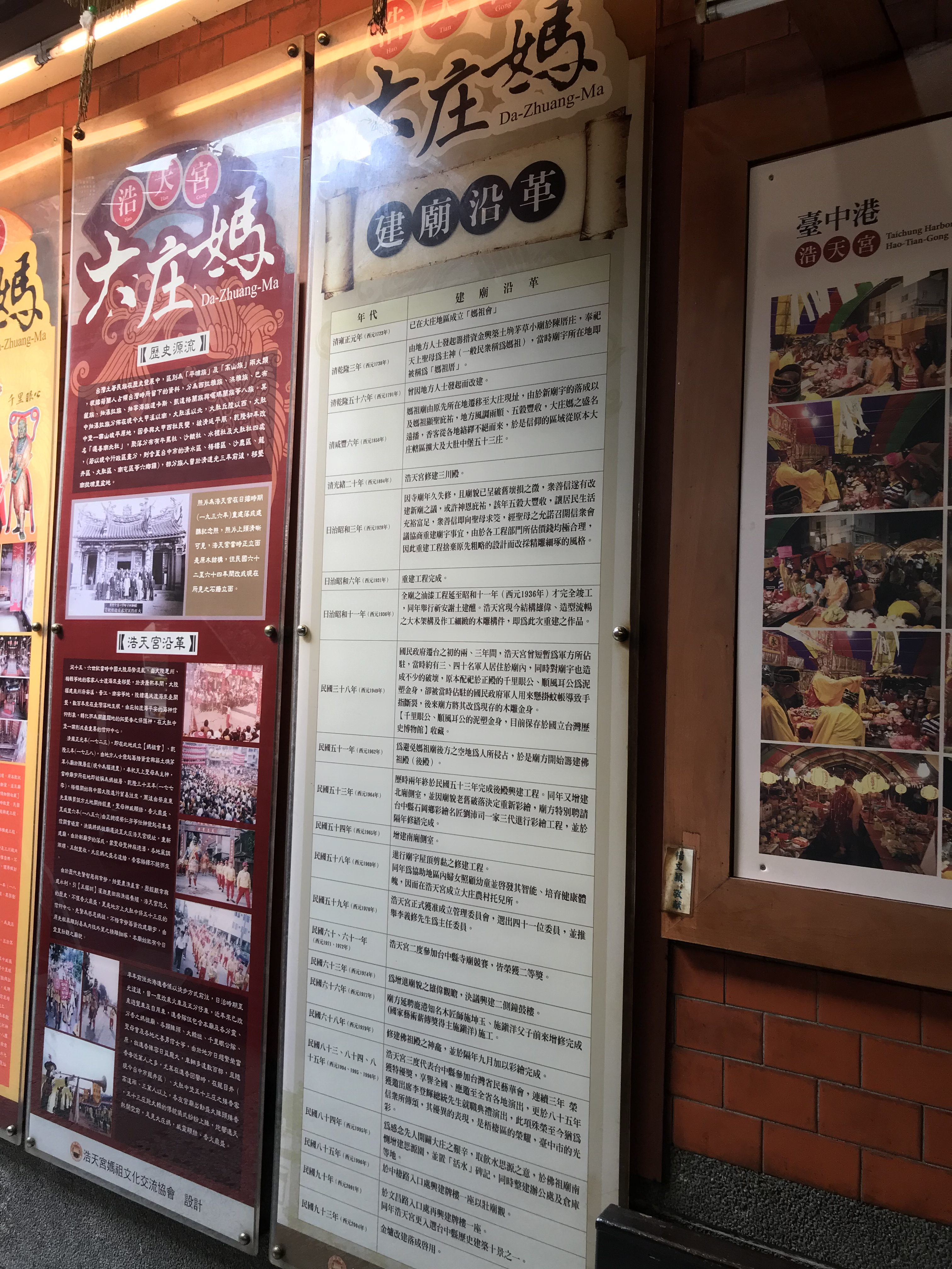 中文（台灣）: 大庄浩天宮建廟沿革